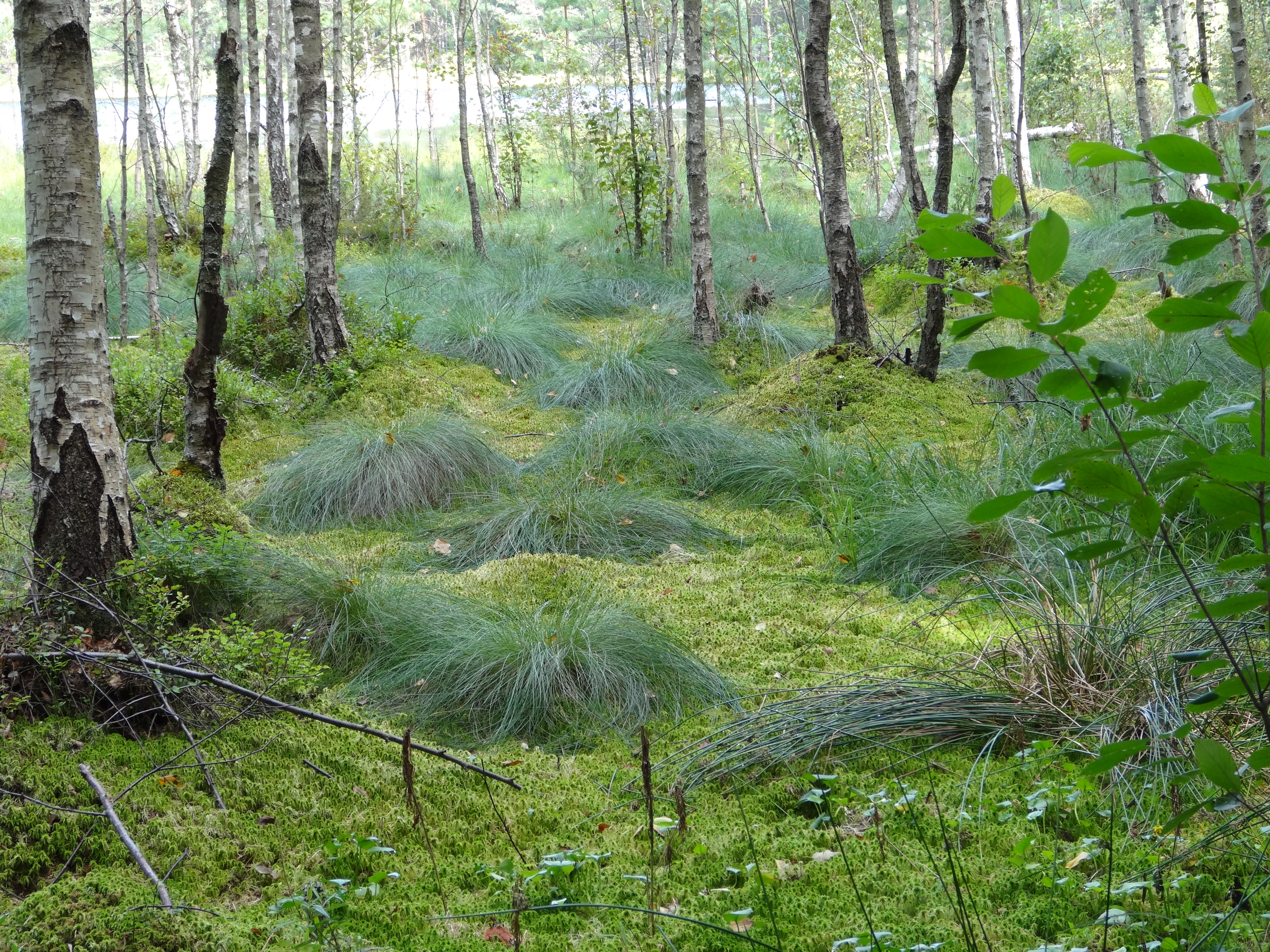 Rezerwat leśno-torfowiskowy "Królewska Sosna" położony w Mazurskim Parku Krajobrazowym. Utworzony został w 1959 roku dla ochrony drzewostanu Puszczy Piskiej oraz boru mieszanego.